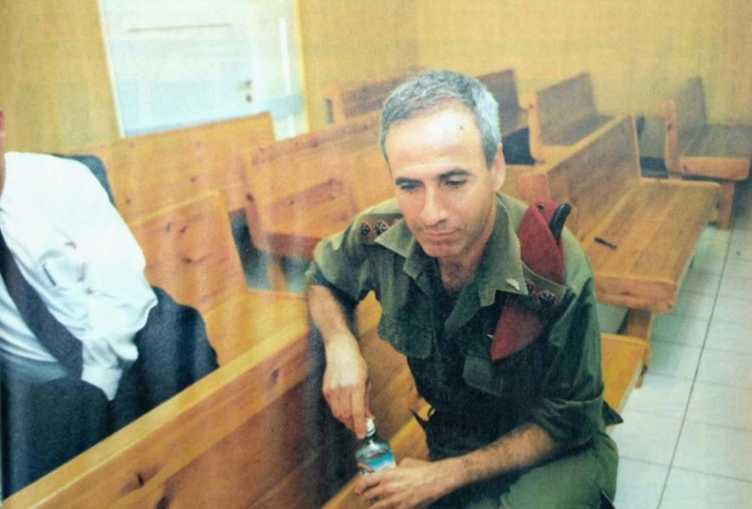 אל"ם עמוס בן-אברהם בבית הדין הצבאי.